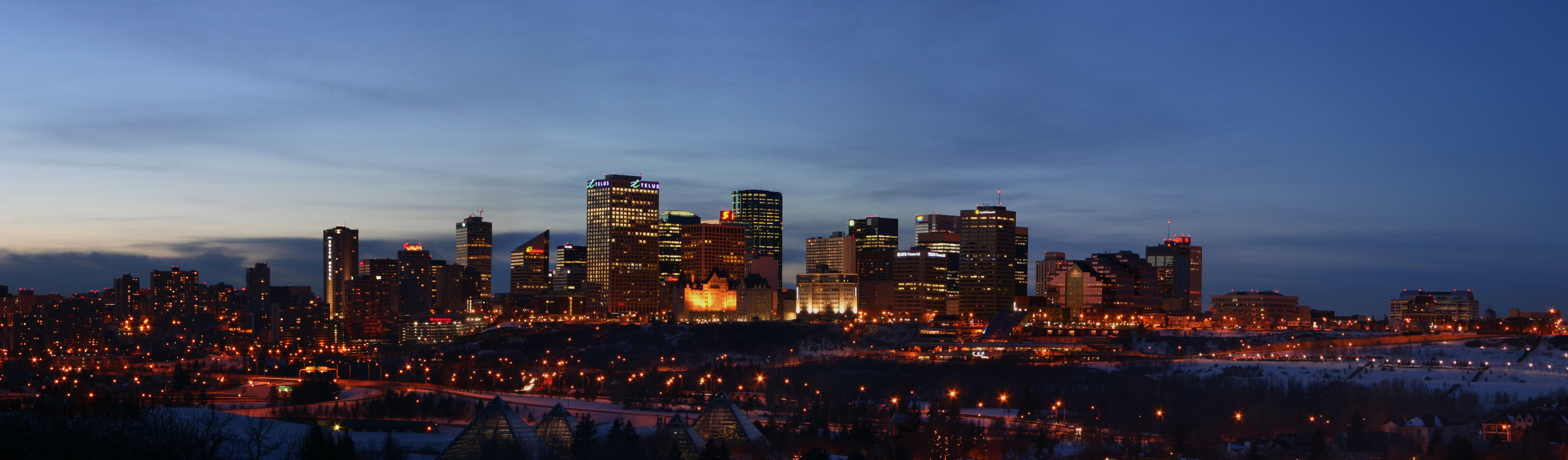 Panorama of Edmonton, Alberta, Canada.